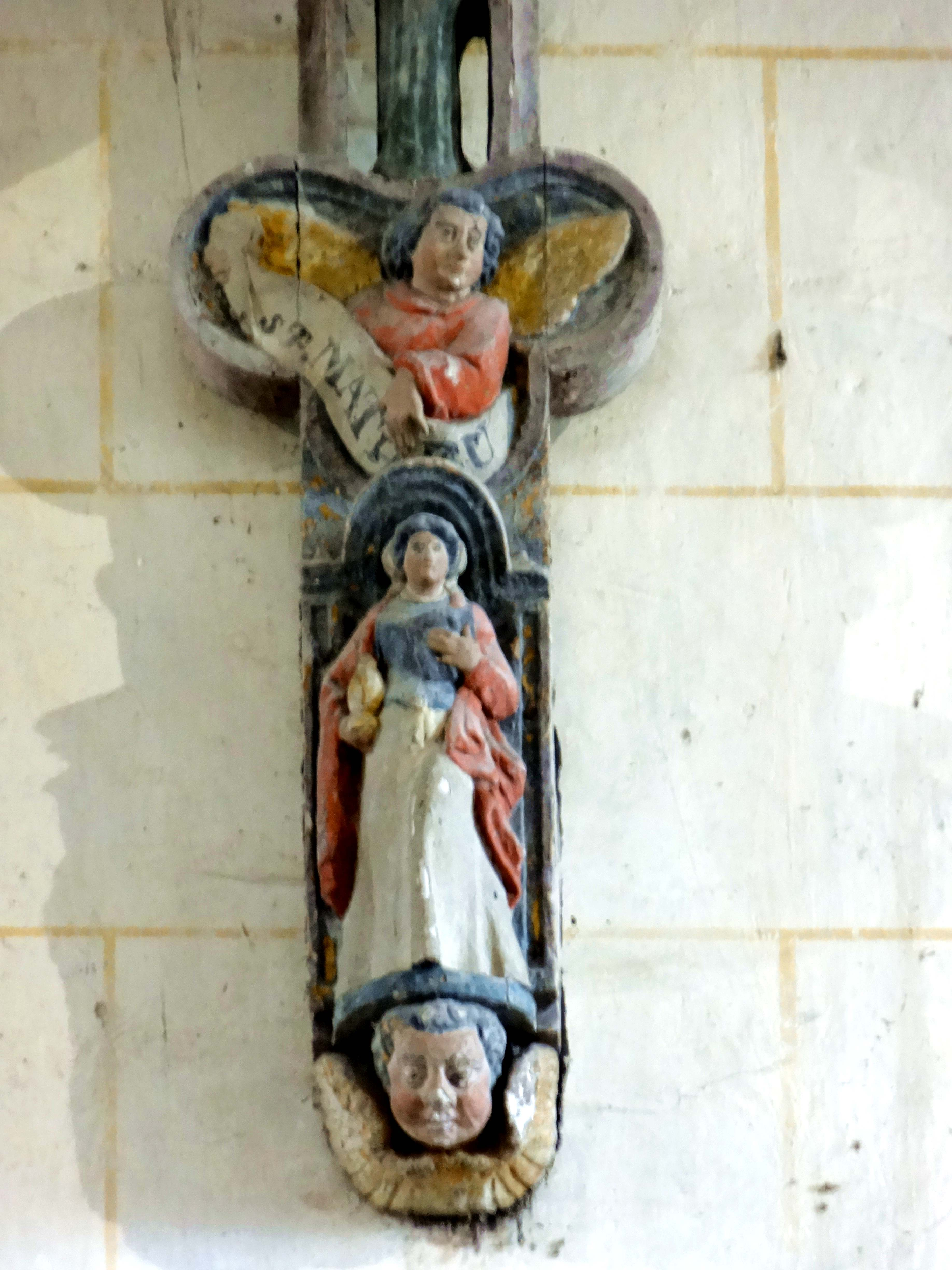 Mobilier de l'église - voir titre.